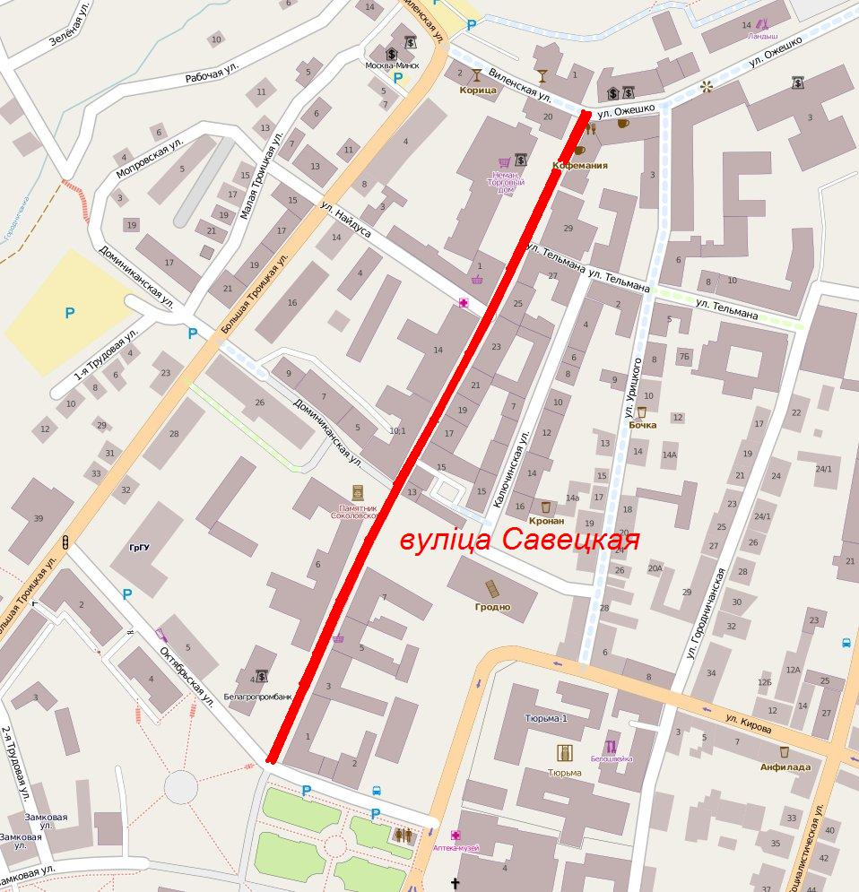 Беларуская (тарашкевіца): Вуліца Савецкая на мапе Гродна